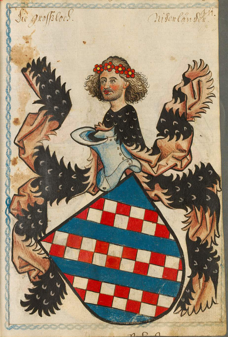 Scheibler'sches Wappenbuch , älterer Teil; Seite 411 die Grosßloch Niederländer